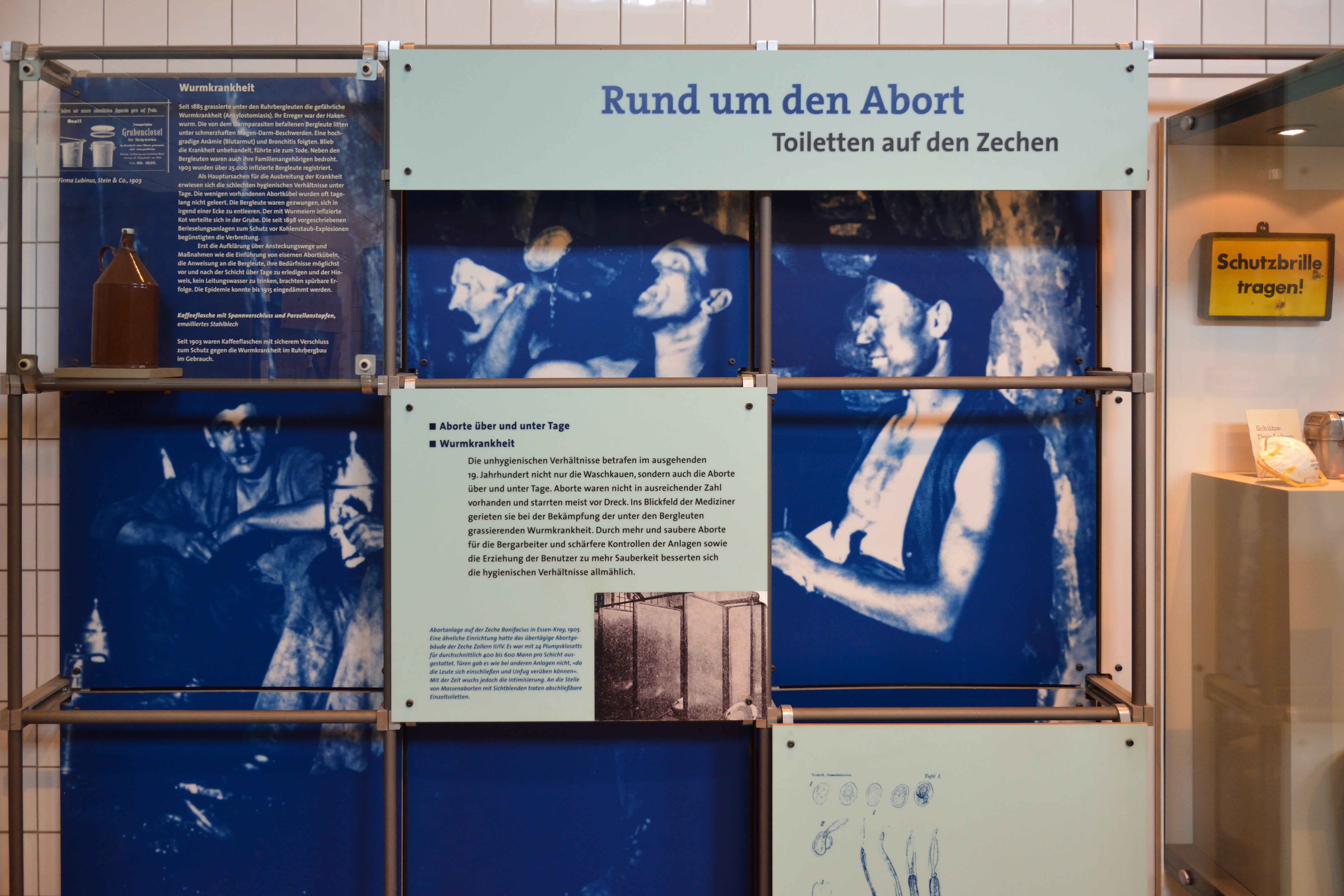 Impressionen von der Zeche "Zollern 2/4" in Dortmund. Hier